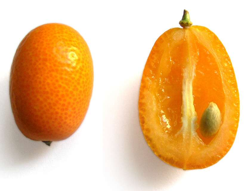 Dos quinotos (Fortunella) entero y partido